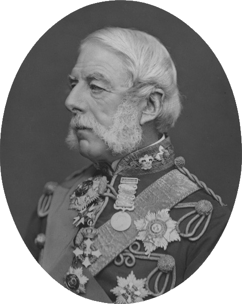 Ричард Эйри, 1-й барон Эйри (1803-1881), британский генерал